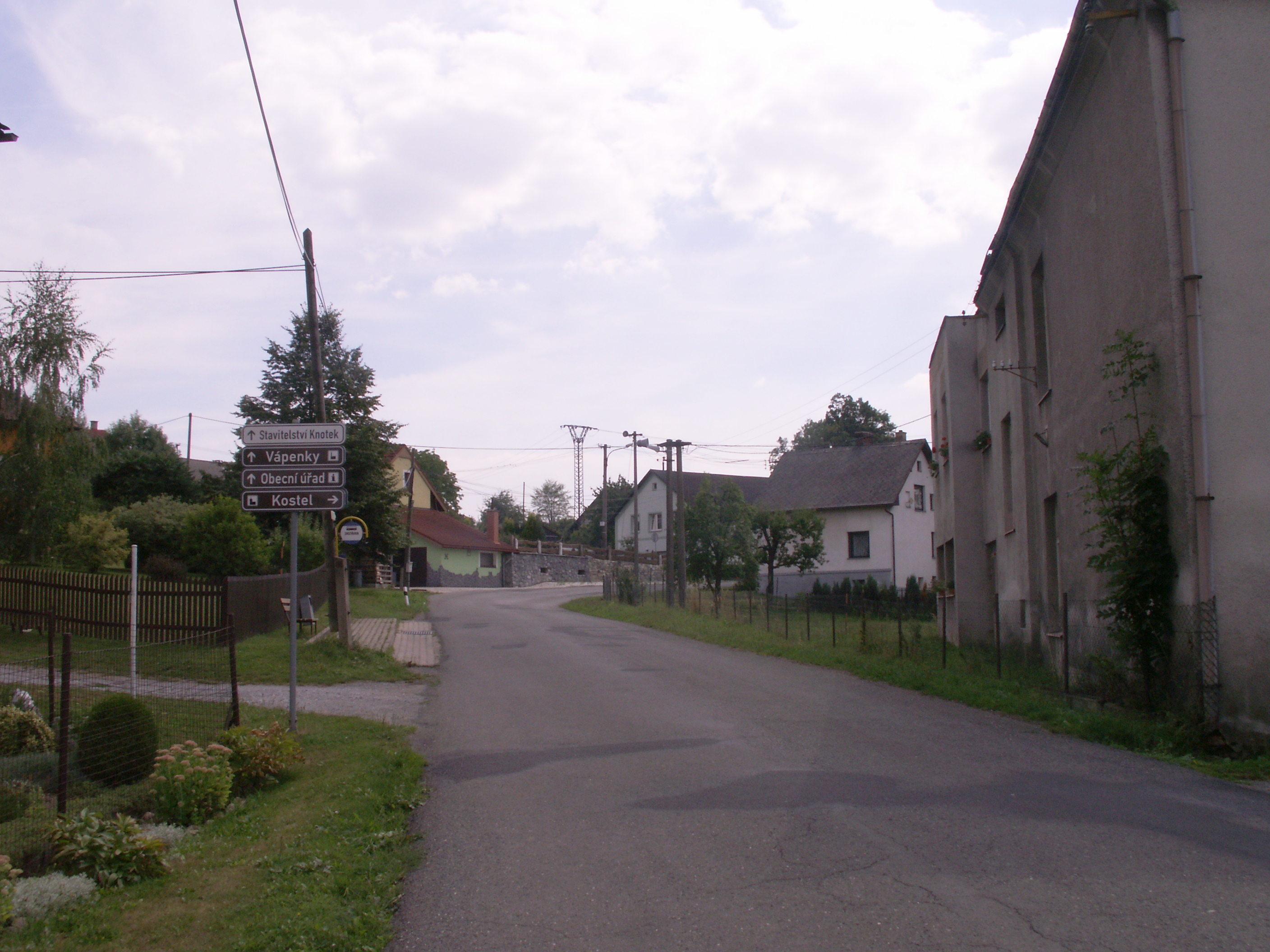 Velké Kunětice, okres Jeseník